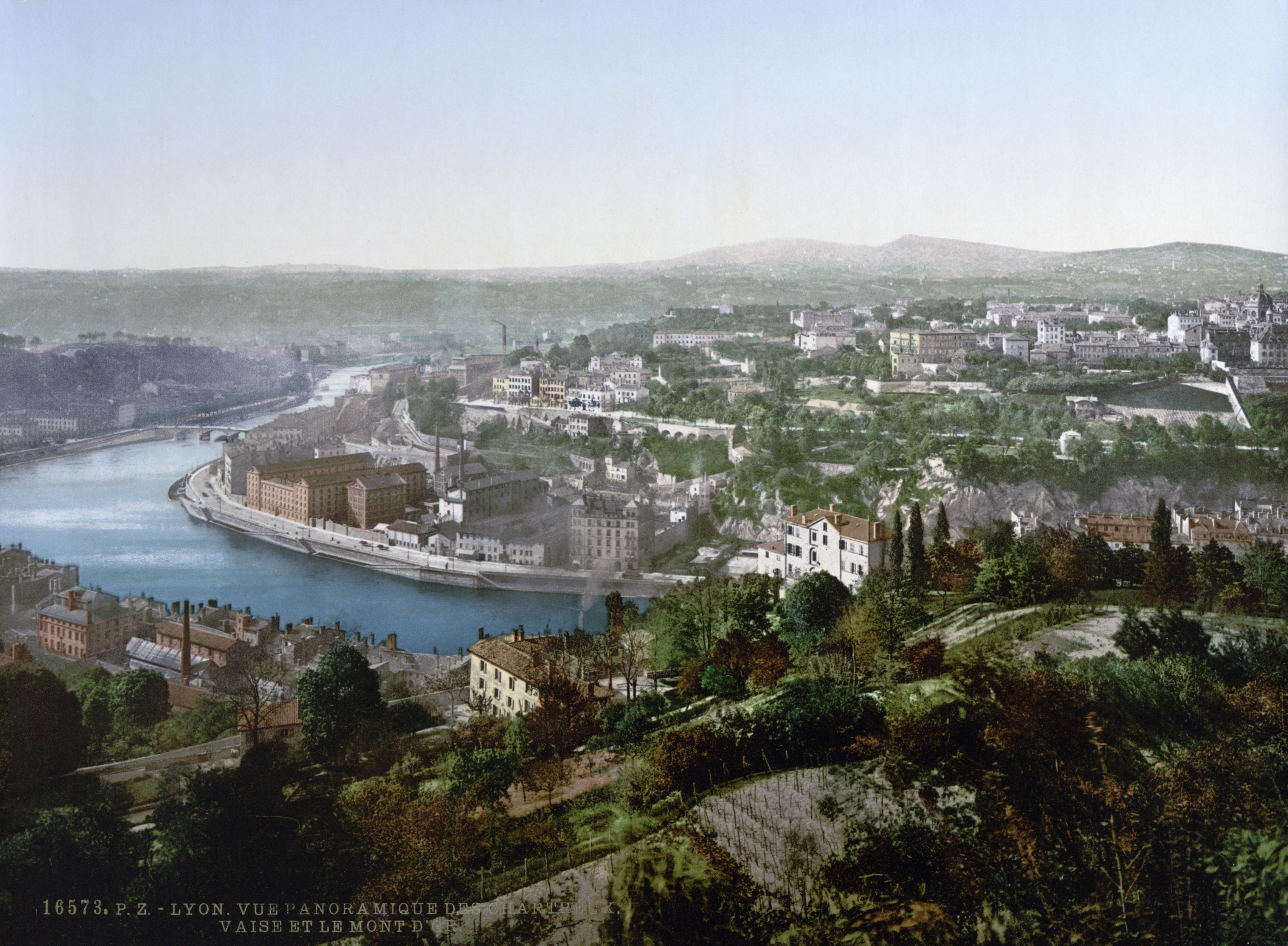 Vaise et la Croix-Rousse depuis Fourvière